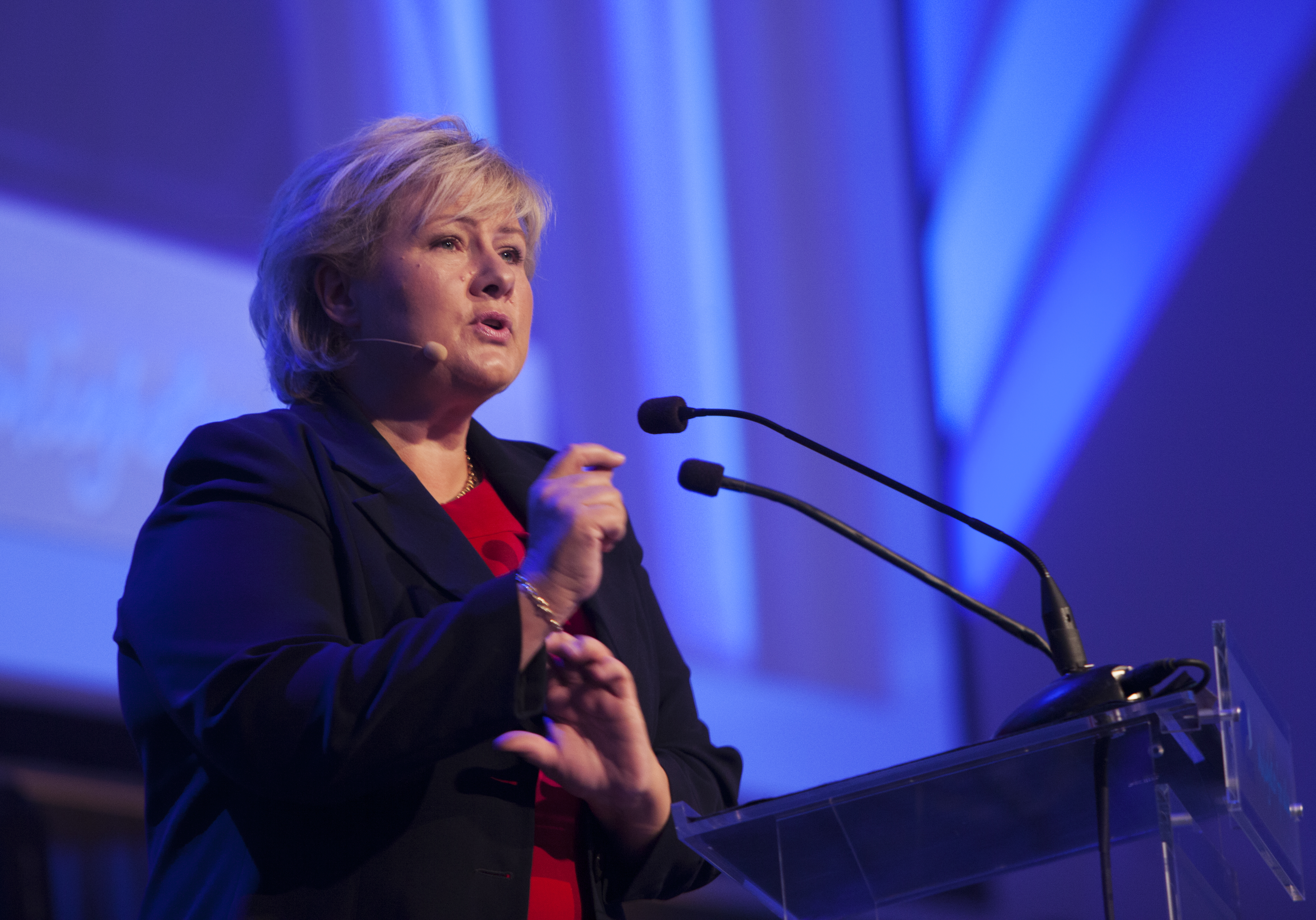 Erna Solberg på Kommunalkonferansen i Høyre 2012.